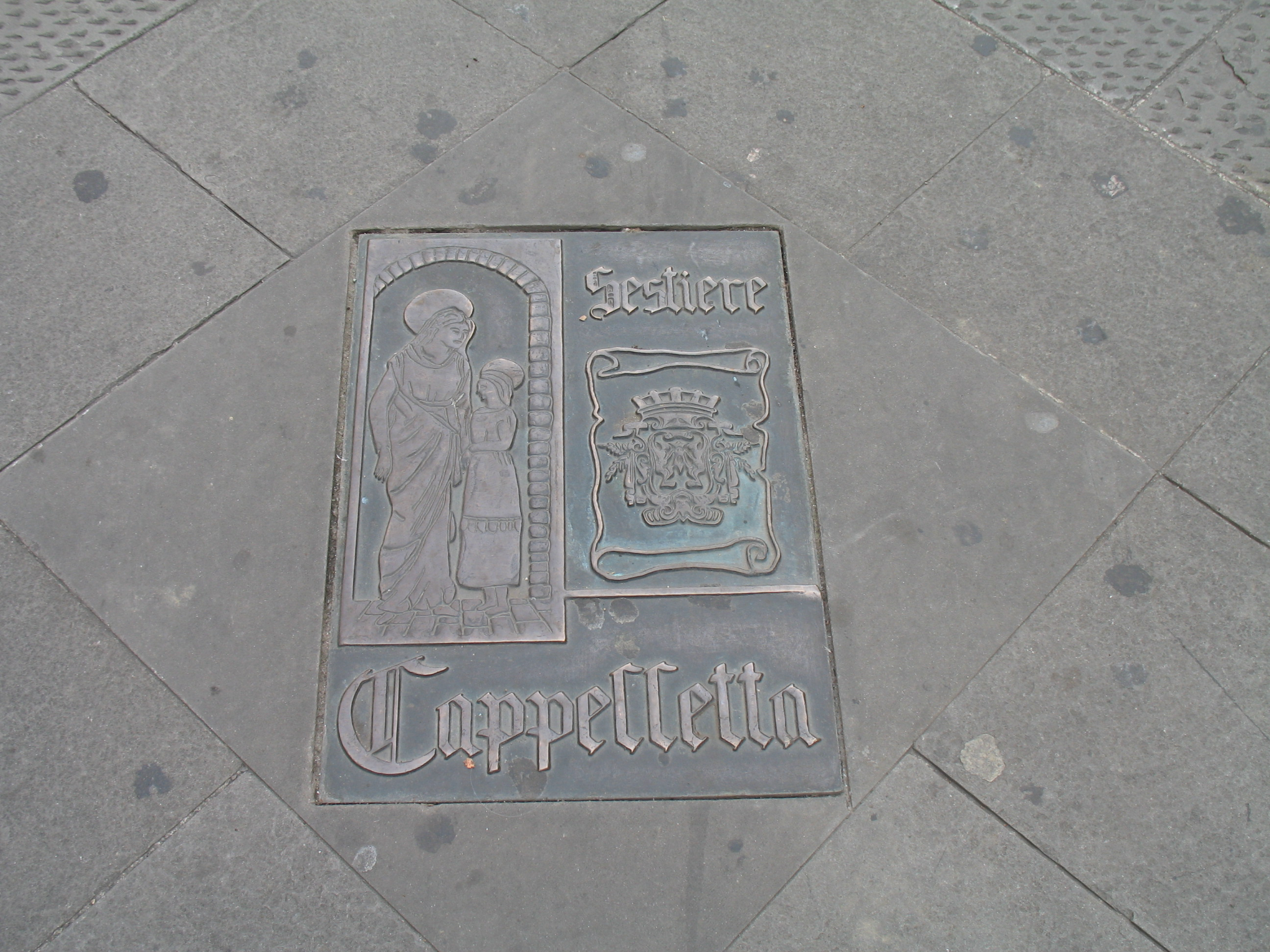 Serie di Immagini da Rapallo e San Michele di Pagana (Rapallo), in provincia di Genova